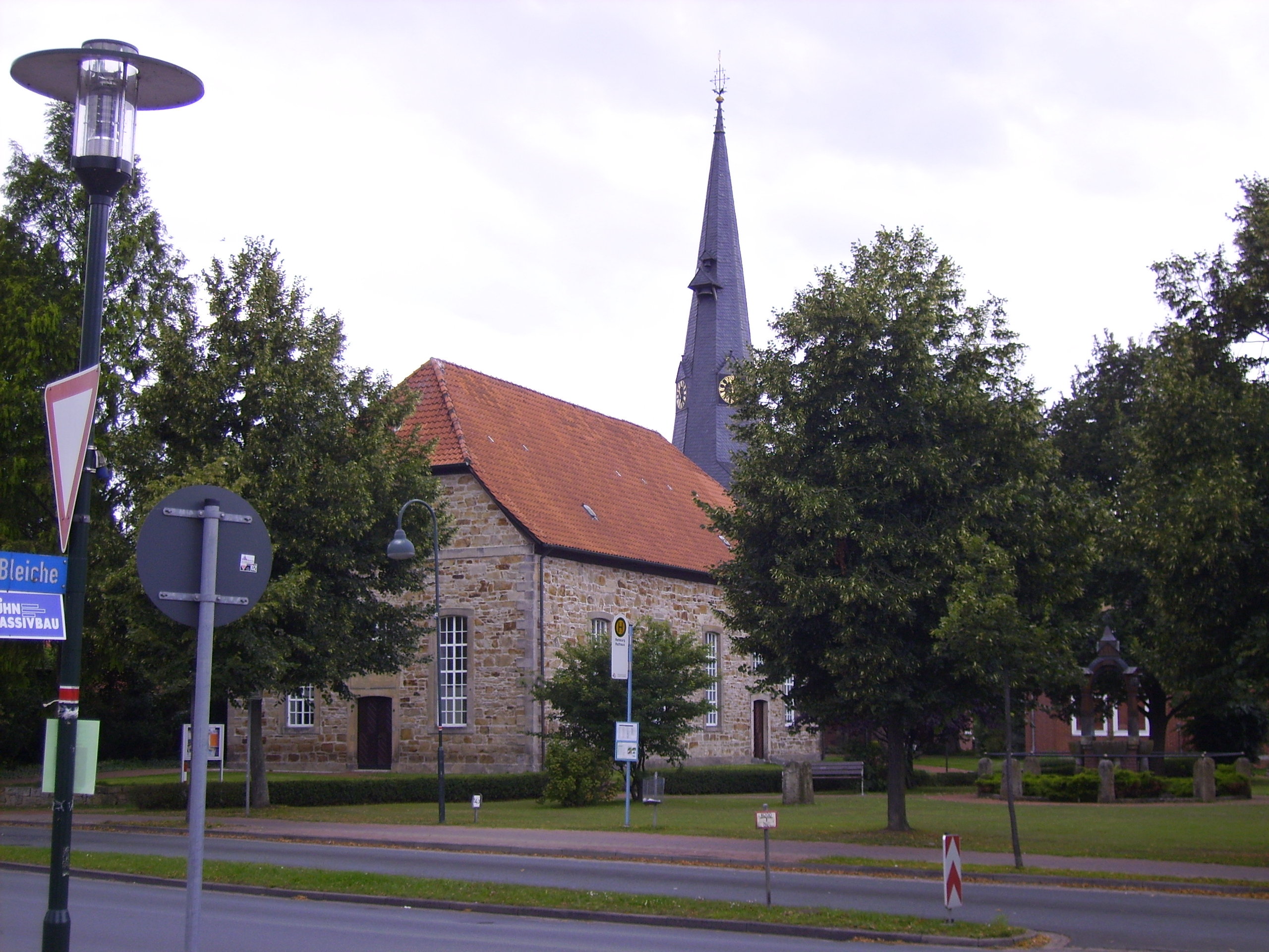 Rehburg: Evangelische St.-Martini-Kirche